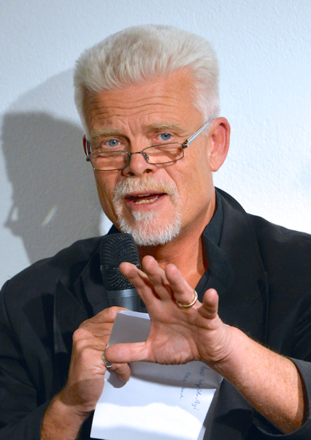 Mattias Gardell, professor i religionshistoria, deltar i ett seminarium om hur synen på tortyr ändrats under tiden från terrorattackerna den 11 september år 2001. Arrangör: Amnesty Internationals Juristgrupp i samarbete med Bibliotek Plattan. Plats: Forum/Debatt, Plattanscenen, Kulturhuset Stadsteatern i Stockholm den 6 mars 2014.